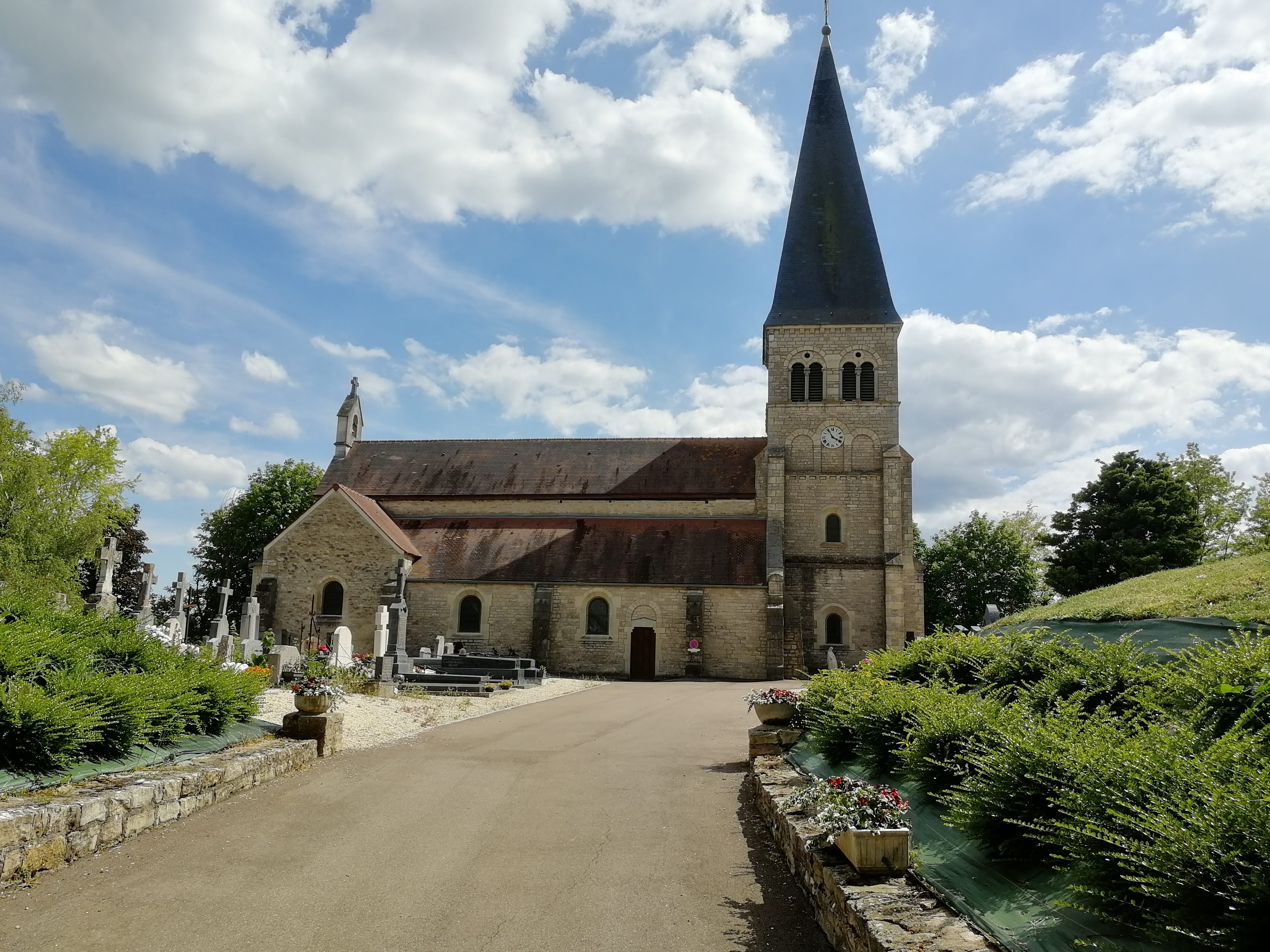 Fauverney, Côte d'Or, Bourgogne, France)